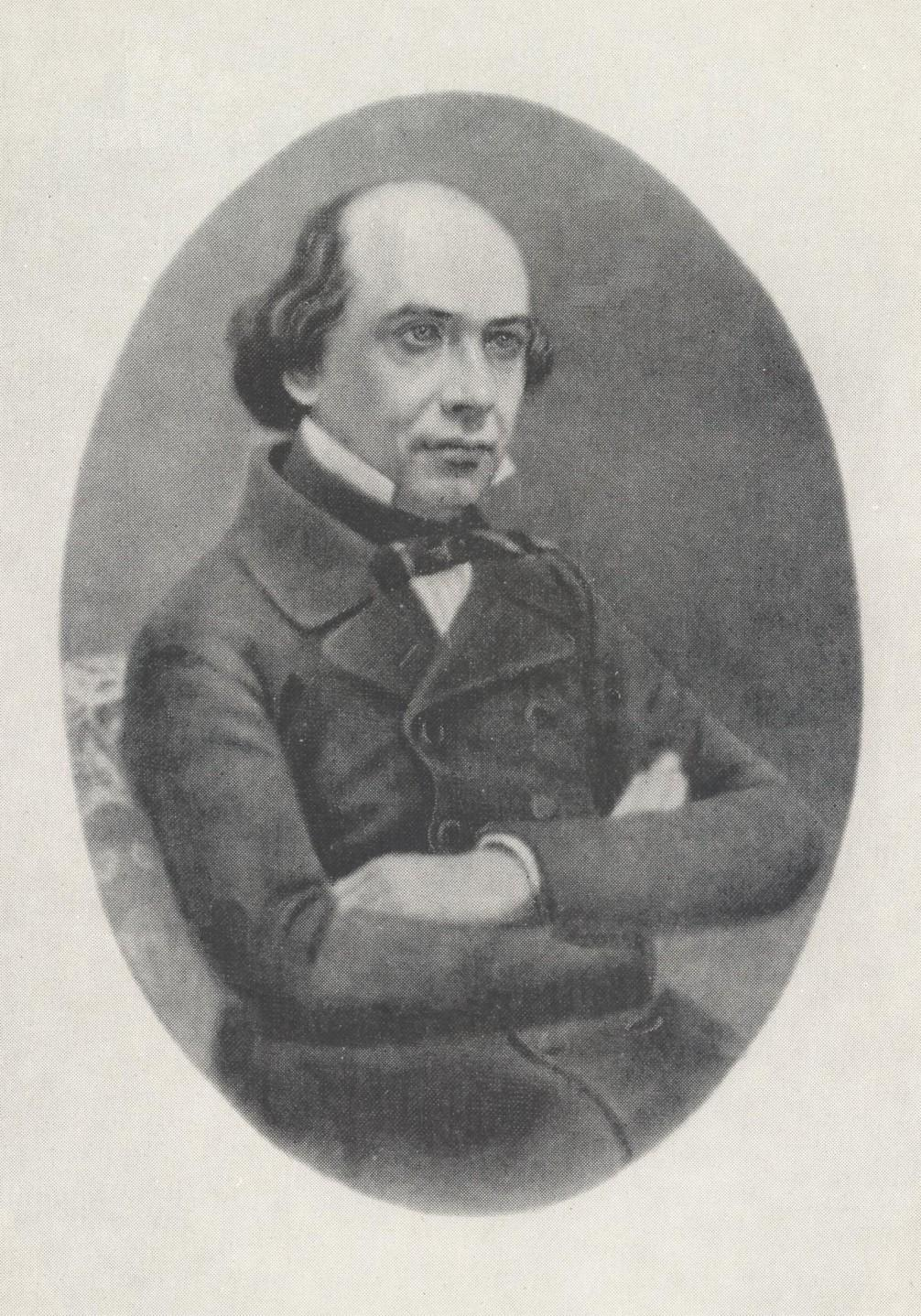 Portrait of russian historian Timofey Granovskij (1813—1853) = Тимофей Николаевич Грановский (1813—1853), историк, профессор Московского университета